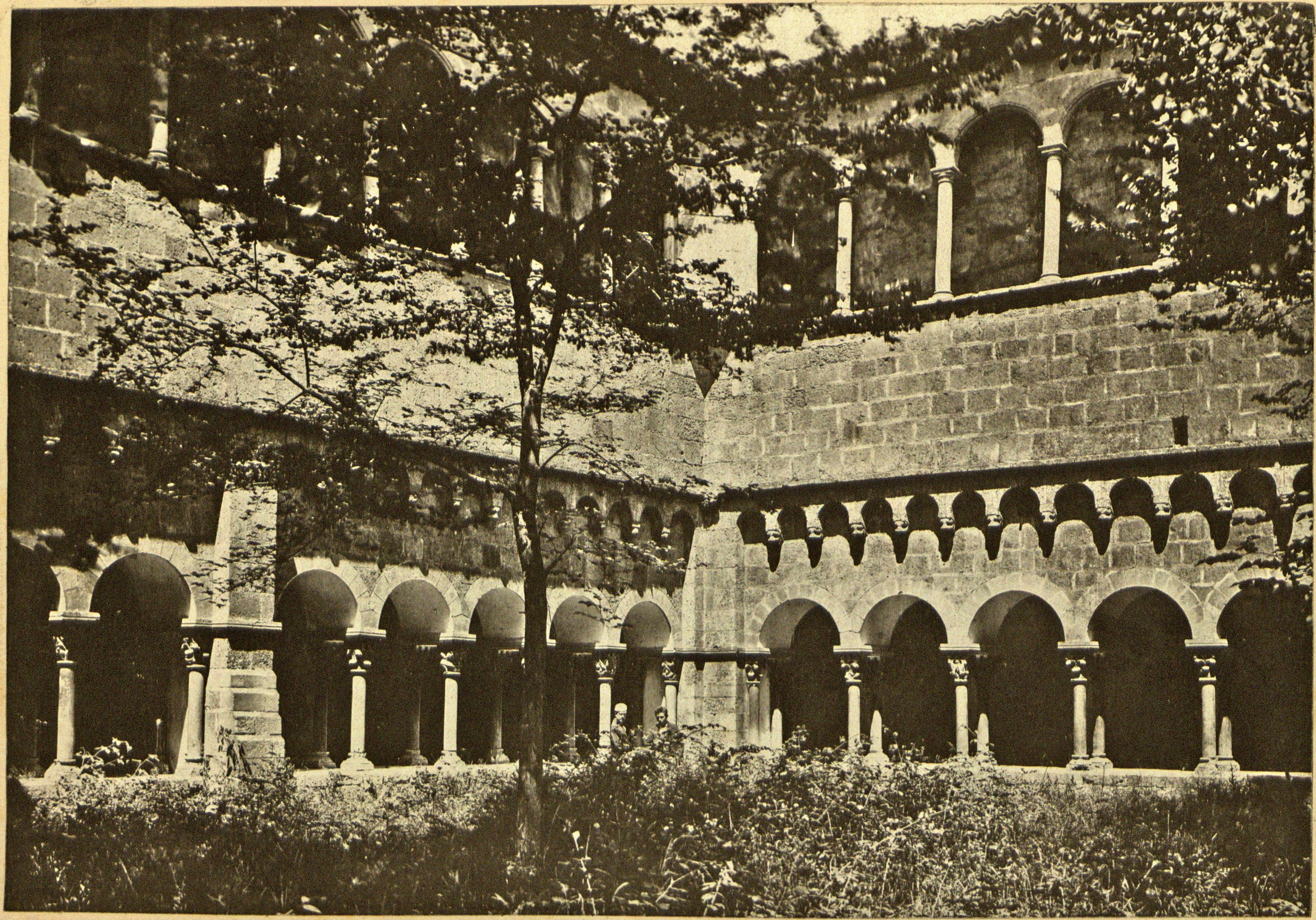 'Claustre de Sant Cugat del Vallès', fotografia d'Heribert Mariezcurrena (~1878). Estampa núm. 10, acompanyada de text explicatiu, a l'Album Pintoresch-Monumental de Catalunya: aplech de vistas dels més notables monuments i paisatjes d'aquesta terra acompanyadas de descripcions y noticias históricas y de guias pera que sían fácilment visitats, publicat per l'Associació Catalanista d'Excursions Científiques el 1878. De disposició lliure al dipòsit digital de documents de la UAB.